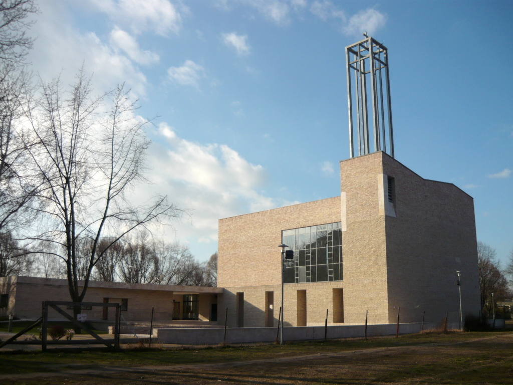 Roman Catholic church in Újpalota